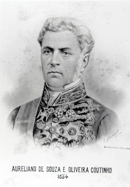 Aureliano de Sousa e Oliveira Coutinho, o Visconde de Sepetiba.